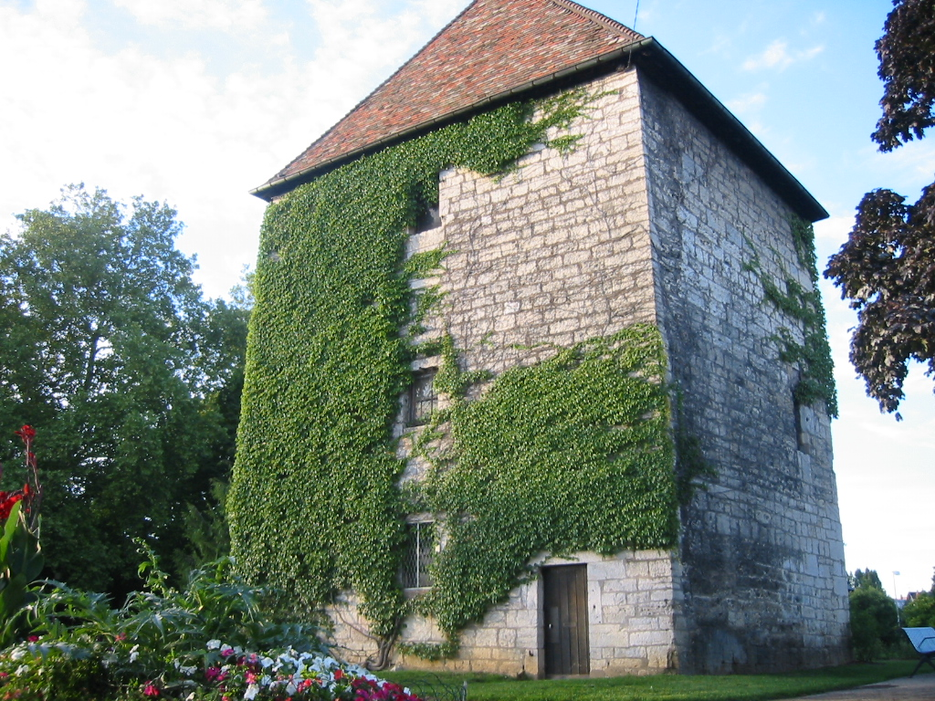 Tour carré de Besançon